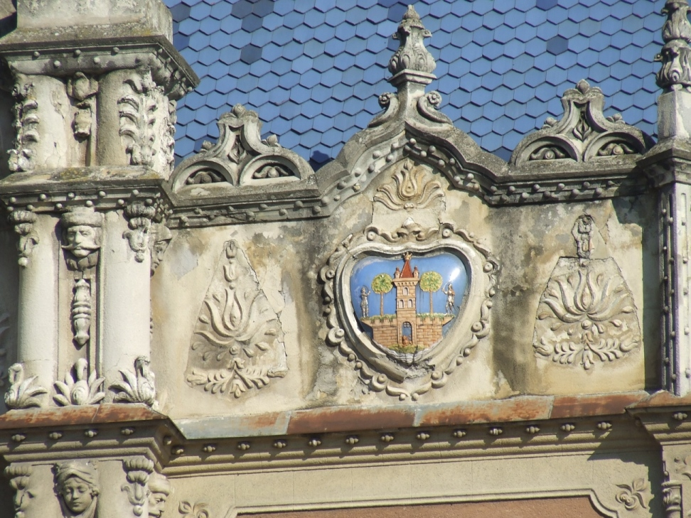 Dacia Hotel, Satu Mare, Romania